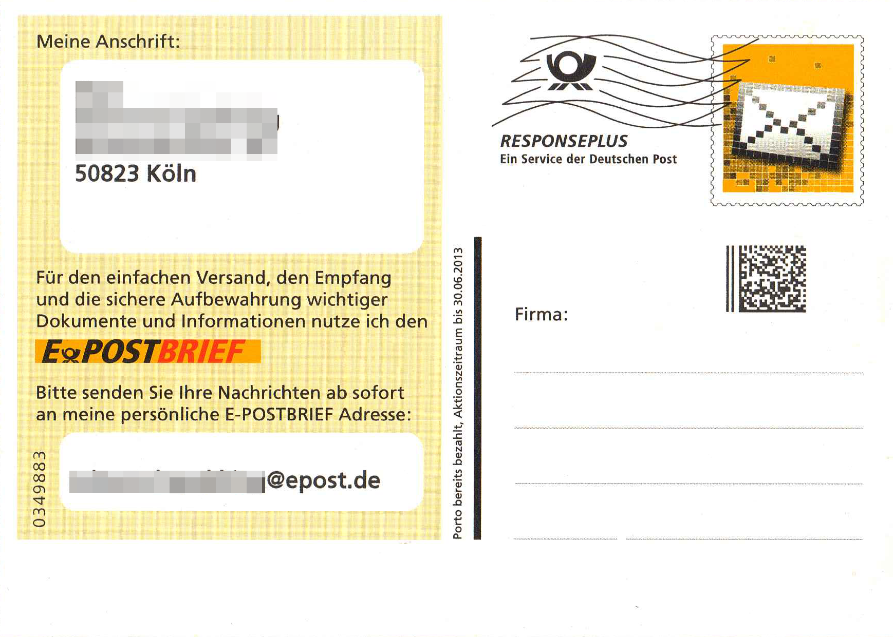 Responseplus-Postkarte der Deutschen Post AG, um Dritten die eigene ePostbrief-Adresse mitzuteilen. Im Gegensatz zur normalen Werbeantwort-Postkarte enthält diese hier einen DataMatrix-Code